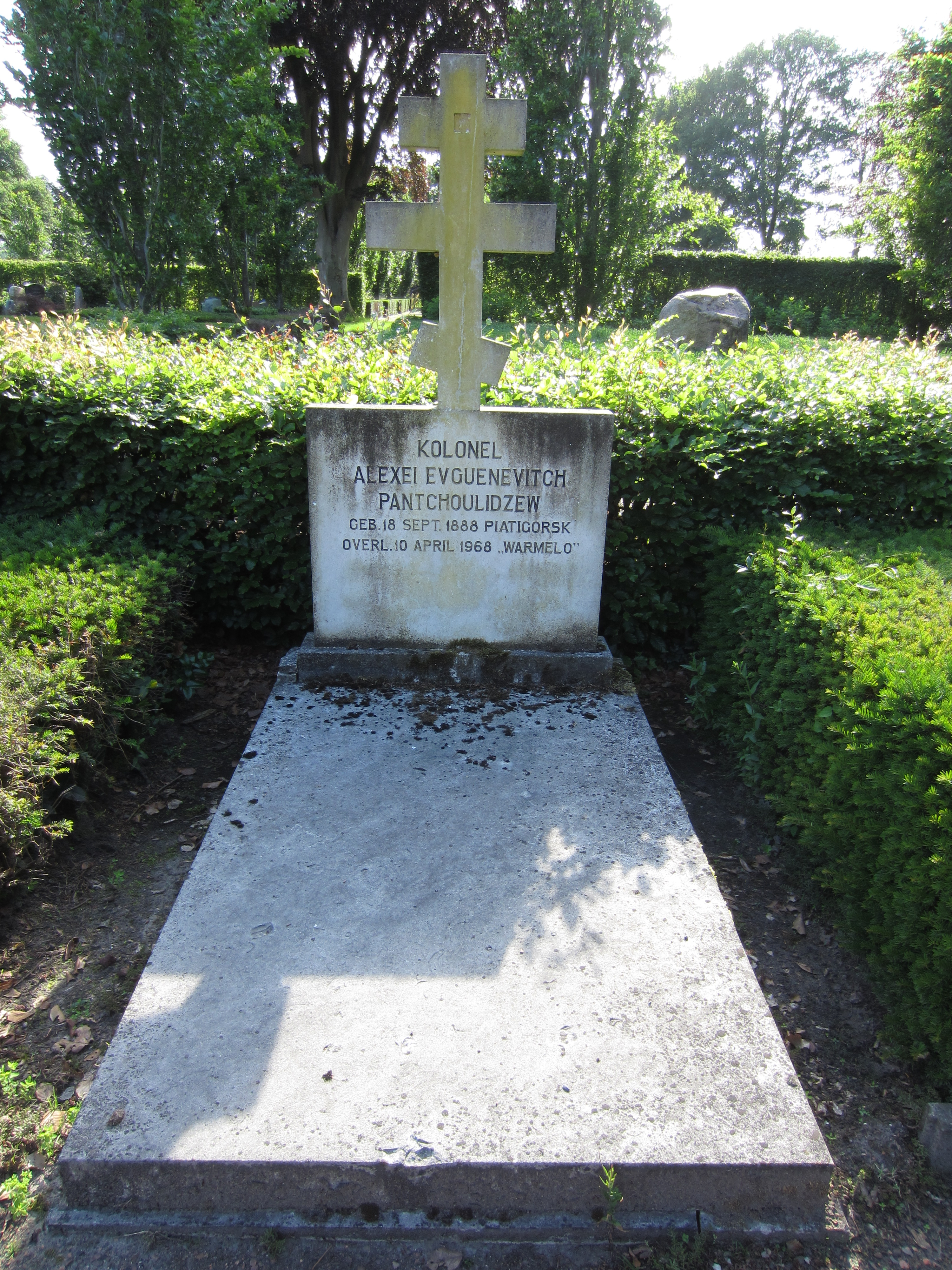 Het graf van Alexei Evguenevitch Pantchoulidzew (Piatigorsk, 18 september 1888 – Warmelo [Diepenheim], 10 april 1968) op de Algemene begraafplaats Diepenheim.